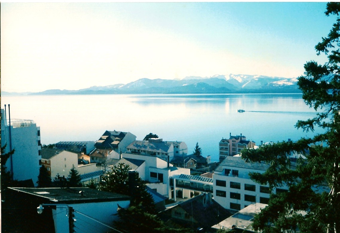 Vista del lago Nahuel Huapi en Bariloche